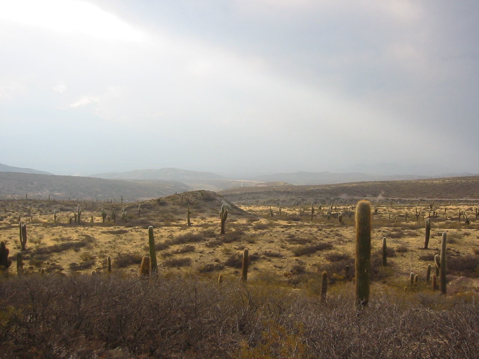 Ruta pronvincial 33, camino a Cachi. Provincia de Salta. Argentina